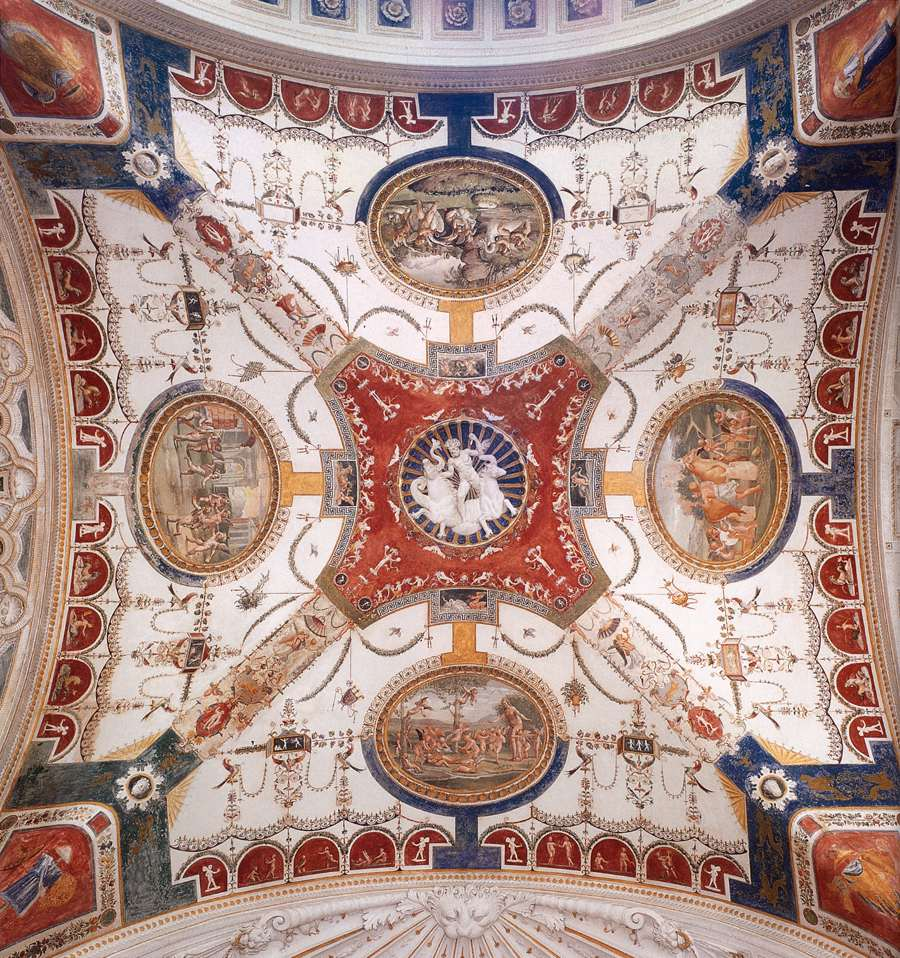 detail